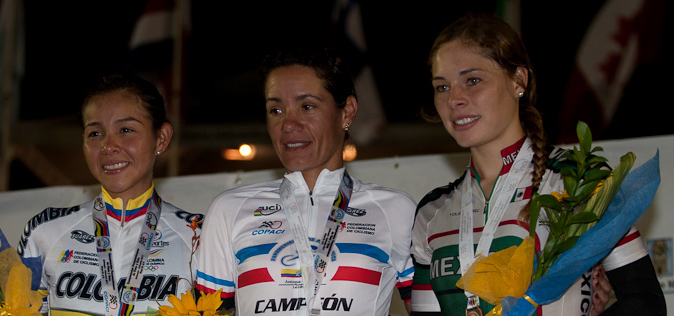 El podio de la prueba scratch femenina Campeonato Panamericano de Ciclismo de Pista, Medellín. 4 de mayo de 2011.